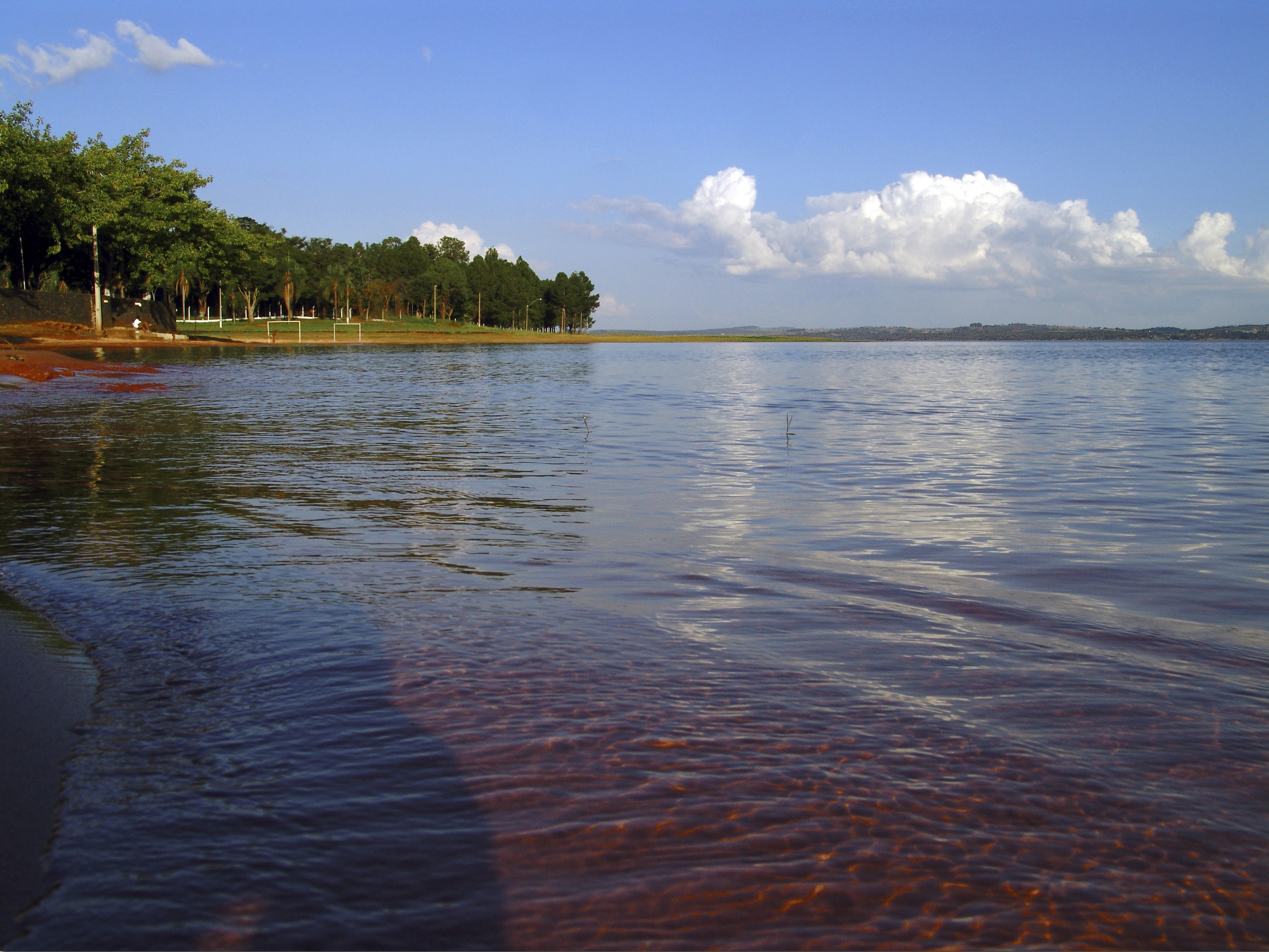 Plage du camping municipal d'Avaré.